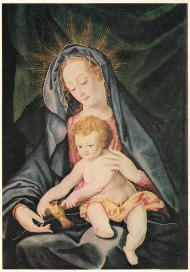 Imagen de la Virgen María y el Niño jugando con un pajarito